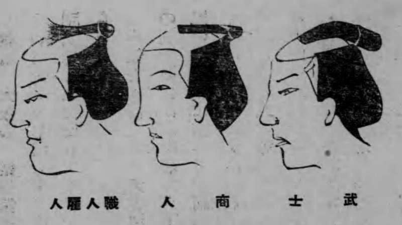 身分の違いによるちょんまげ